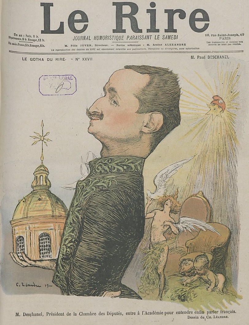 Caricature de Paul Deschanel, président de la Chambre des députés et membre de l'Académie française, publiée dans Le Rire.